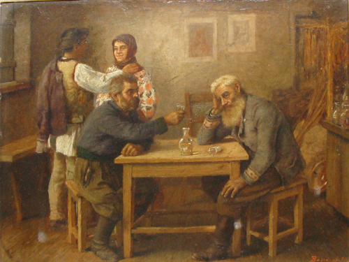 Ludovic Bassarab - În cârciumă, ulei/lemn, semnat, datat (1)907 dreapta jos cu roşu, 15x19,6 cm.